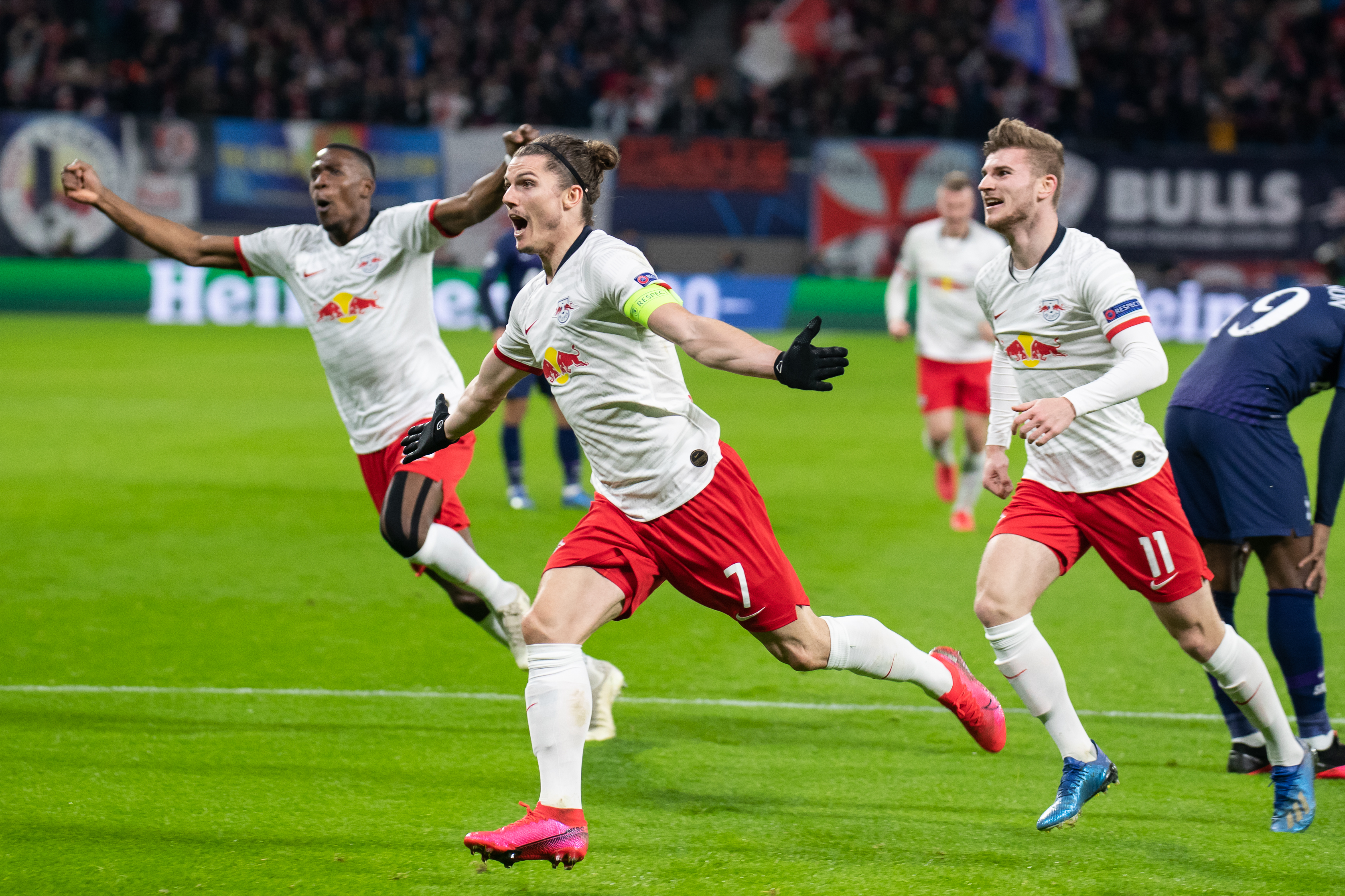 Fußball, Männer, UEFA Champions League Achtelfinale, RB Leipzig - Tottenham Hotspur; Jubel, celebration bei RB Leipzig über das Tor zum 1:0 durch Marcel Sabitzer (RB Leipzig, 7) (Bildmitte); Tor, goal, Torerfolg, Aktion